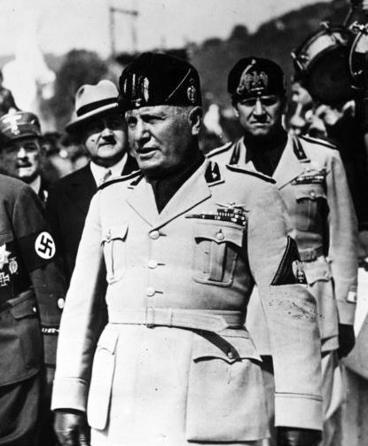 Italien, deutsche Frontkämpfer in Rom Am Sonnabend [19.3.38] fand in Gegenwart des Duce im Forum Mussolini eine grosse sportliche Veranstaltung zu Ehren der deutschen Frontkämpfer, die zur Zeit in Rom weilen, statt. U.B.z. Mussolini trifft in Begleitung des Grafen Galeazzo Ciano und des Herzogs von Koburg-Gotha im Forum Mussolini ein. 21.3.1938 [Herausgabedatum] Abgebildete Personen: Sachsen-Coburg und Gotha, Karl-Eduard von: 1884-1954, Herzog, Präsident des Deutschen Roten Kreuzes, Deutschland Mussolini, Benito: Ministerpräsident, Regierungschef, Chef des Faschistischen Großrates, Italien